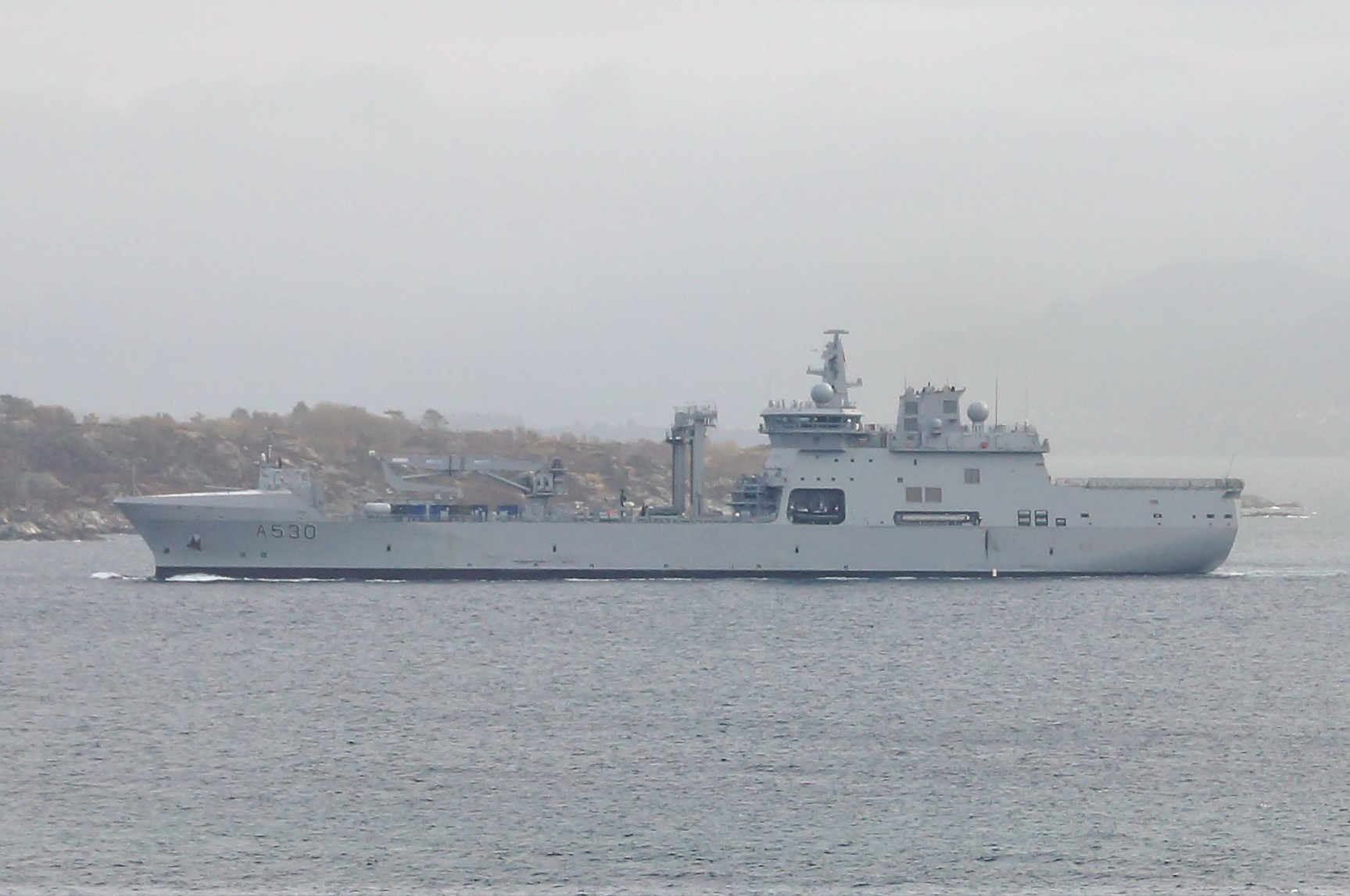 KNM «Maud» i Korsfjorden